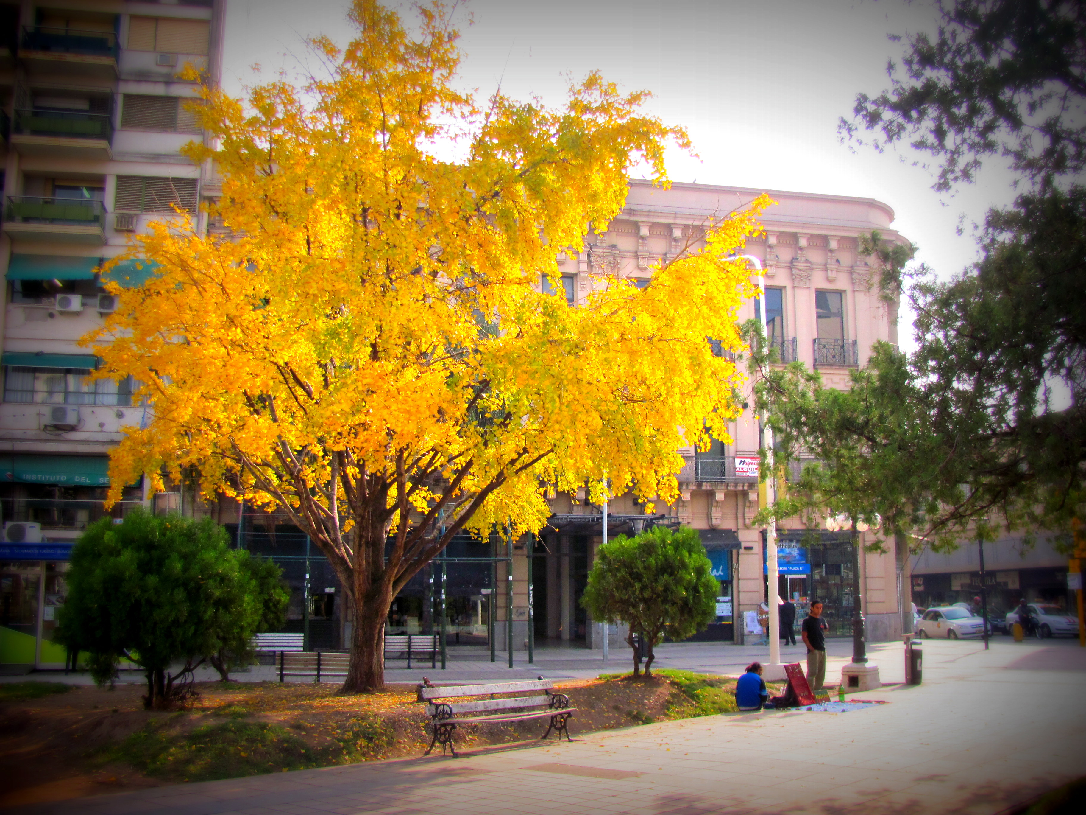 Ginkgo biloba ubicado en la ciudad de Parana, Entre Rios, en la Plaza 1ro. de Mayo